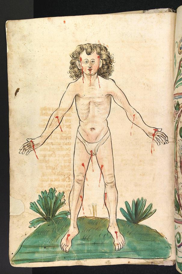 Aderlaßmännlein aus Konrad von Megenberg, Buch der Natur, Hagenau - Werkstatt Diebold Lauber um 1442-1448